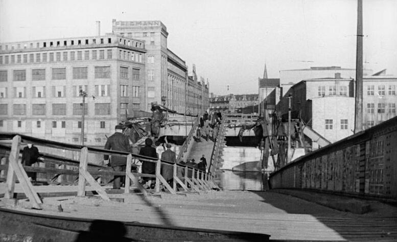 Berlin, Tresckowbrücke, Ruine ADN-ZB Funck-go Berlin Die im II.Weltkrieg zerstörte Treskowbrücke in Oberschönweide. Aufn. Januar 1950